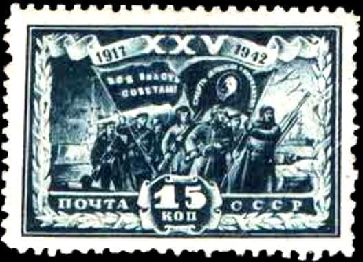 Почтовая марка СССР Красная гвардия 1942 года